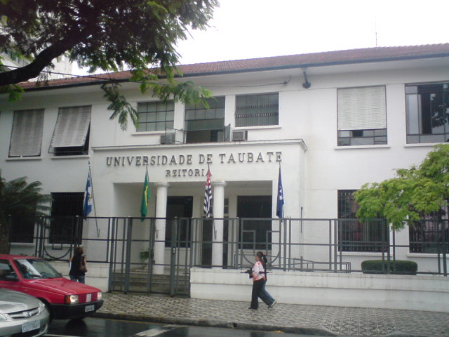 Centro da fachada da reitoria da Universidade de Taubaté (UNITAU)